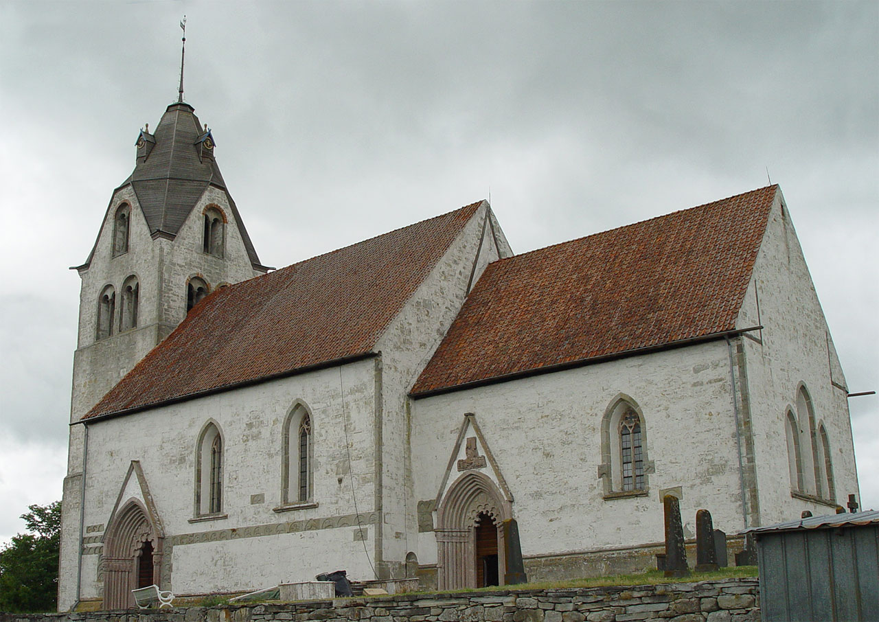 Grötlingbo-Kirche auf Gotland. Turm 13.Jh., Chor und Langhaus Mitte 14.Jh. erbaut von Meister Egypticus, Fassadenreliefs und Taufbecken von Steinmetz Sigraf.